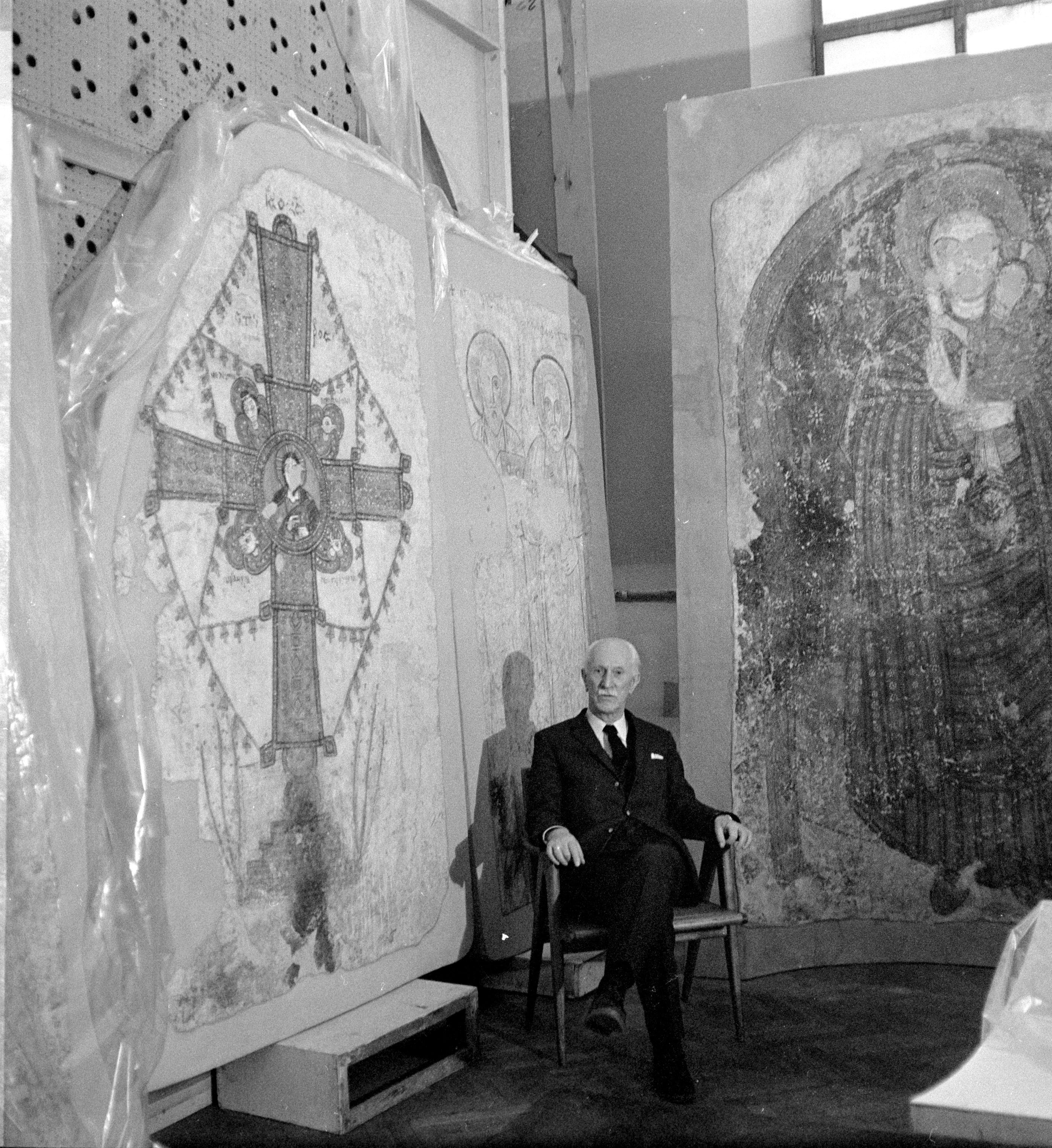 Profesor Kazimierz Michałowski wśród zainstalowanych na pudłach malowideł z Faras, Muzeum Narodowe w Warszawie